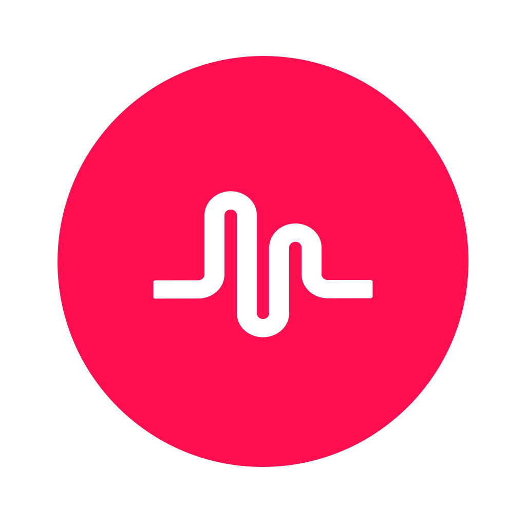 Logo Musical.ly